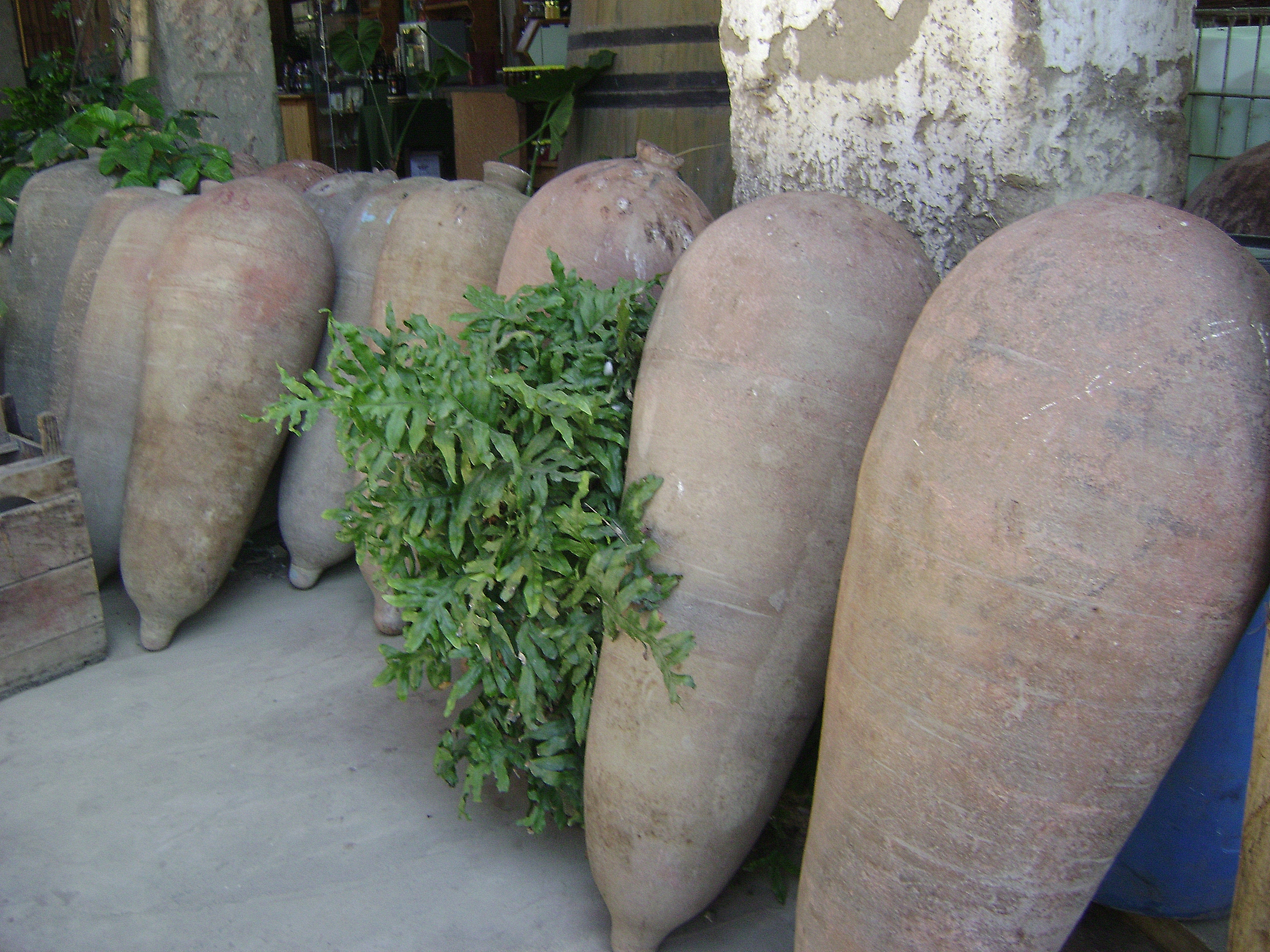 Algunos piscos, envases de arcilla donde se almacena el Pisco (bebida peruana) en las bodegas. Lunahuana, Perú.